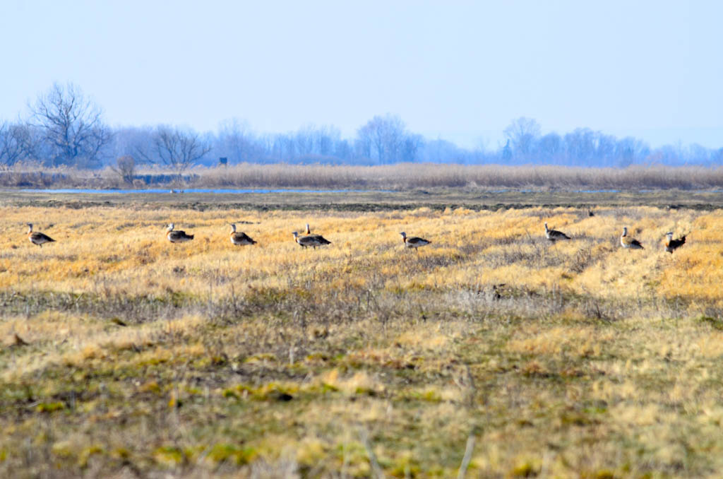 Otis tarda, Andau, Burgenland, Austria.